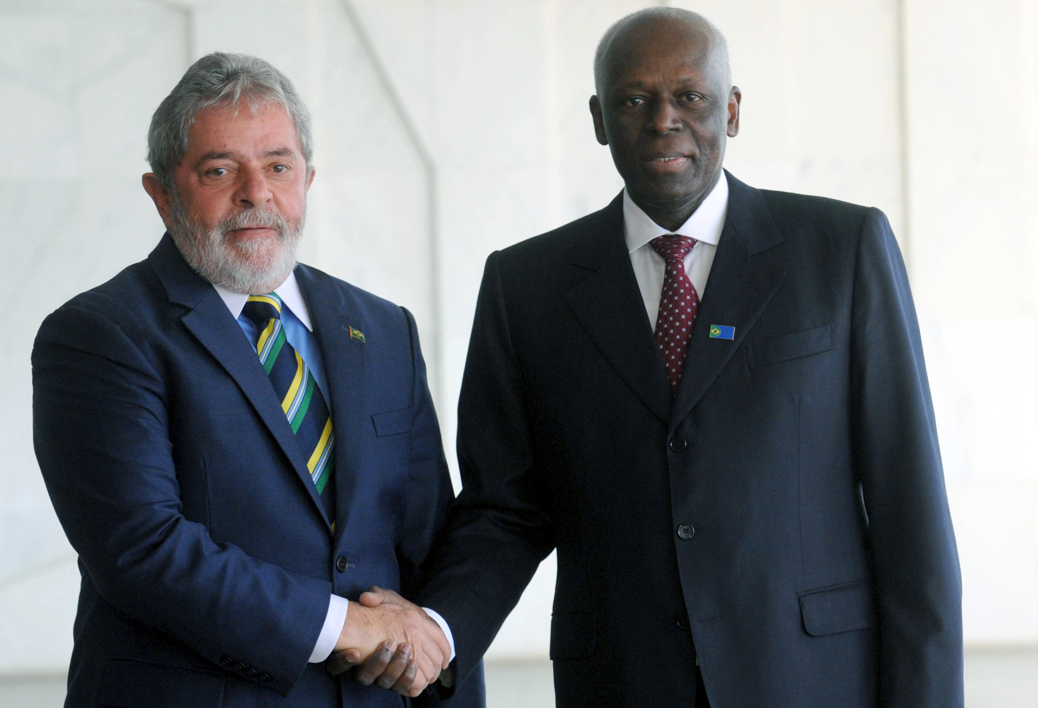 O presidente Luiz Inácio Lula da Silva participa de encontro com o presidente de Angola, José Eduardo dos Santos, no Itamaraty.